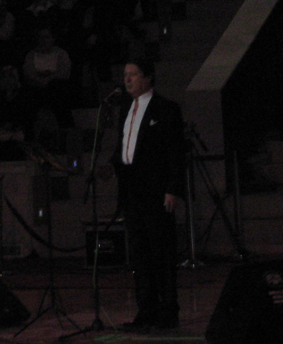 Kendi çekimimden Şeb-i Arûs töreninde Ahmet Özhan konseri, Konya.